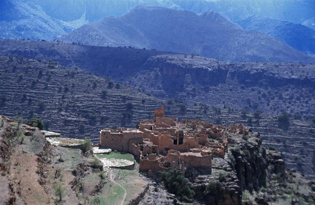 Antiatlas; weitgehend aufgegebene Ortschaft